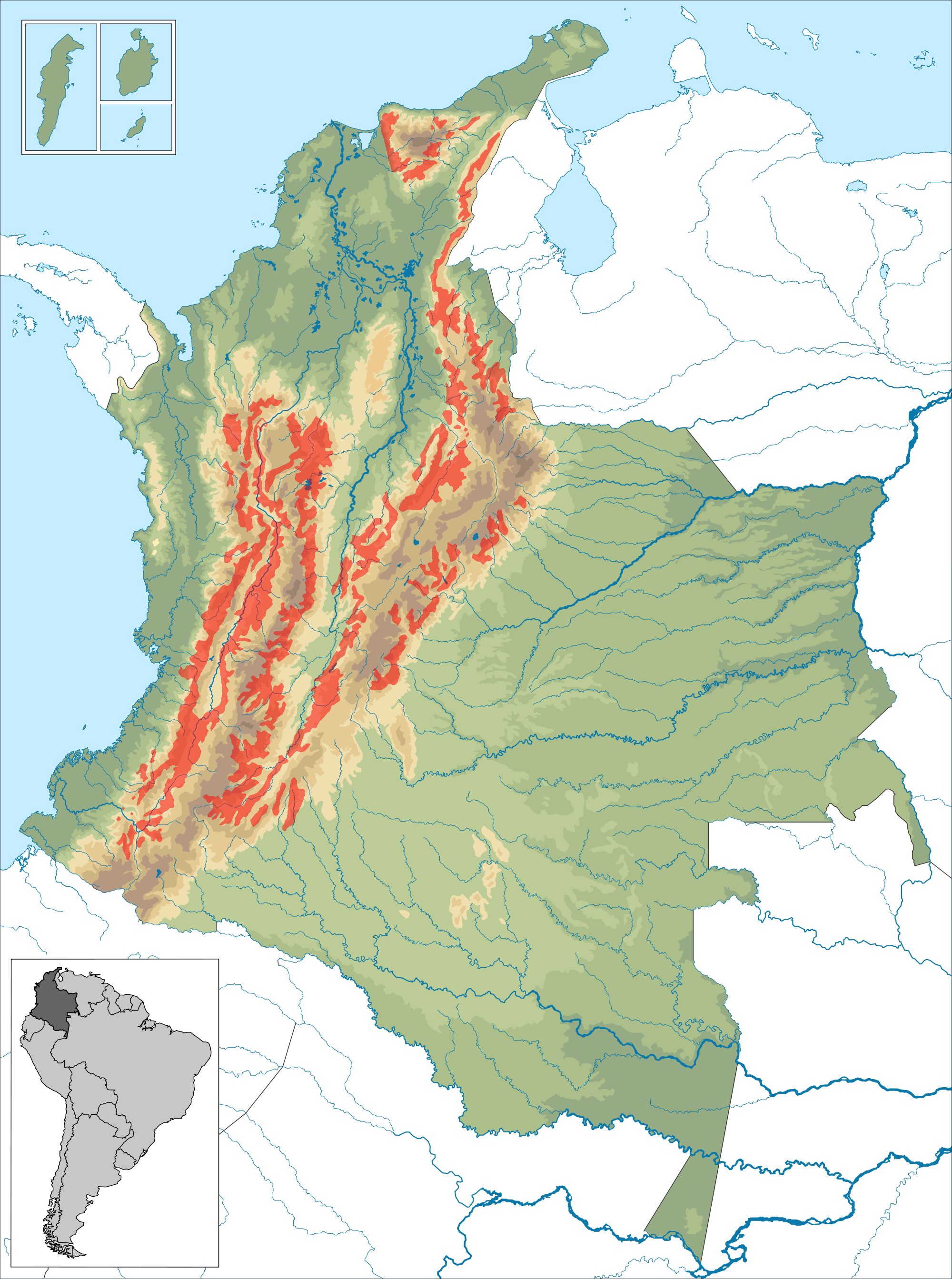 Culture du café en Colombie (1997)